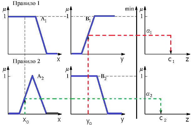 Алгоритм Сугено 0-порядка